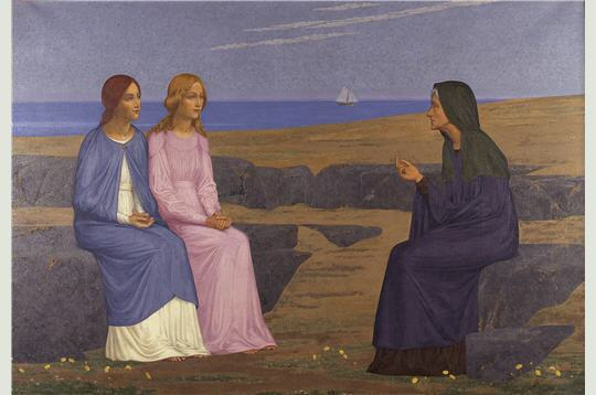 le Récit